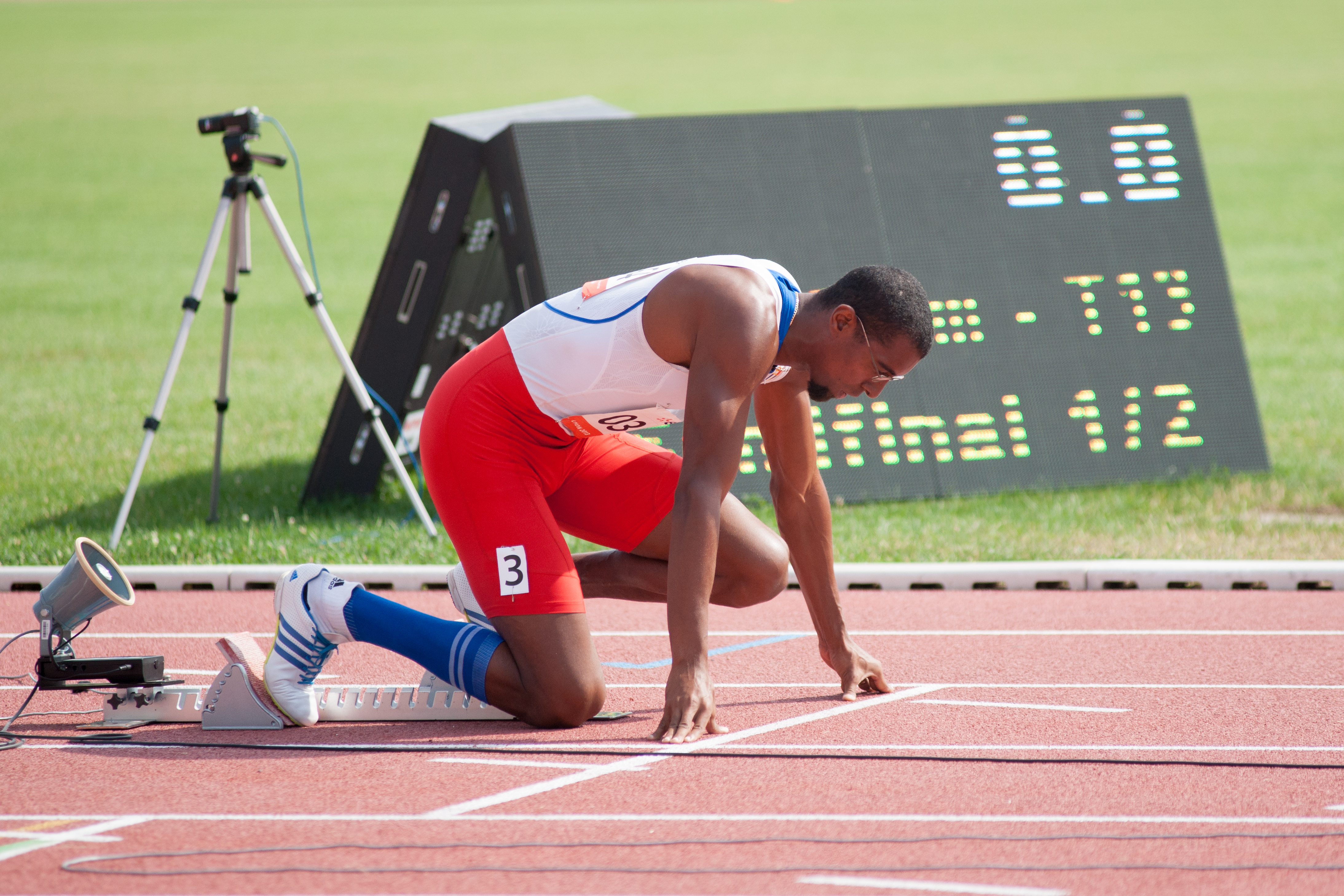 Championnats du monde d'athlétisme handisport 2013.